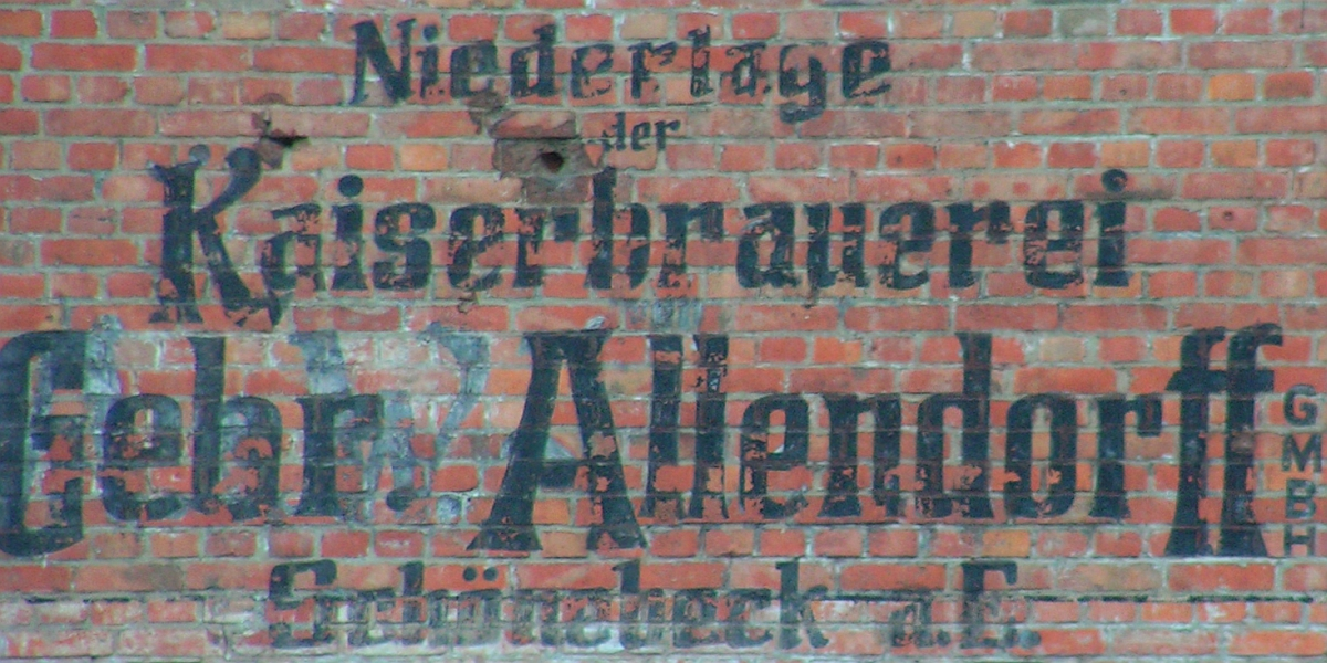 Schönebeck Niederlage der Kaiserbrauerei Gebr. A & W Allendorff GmbH von 1810 Foto 2005 Wolfgang Pehlemann Wiesbaden PICT0131